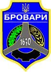 Герб Броваров до 2006 года